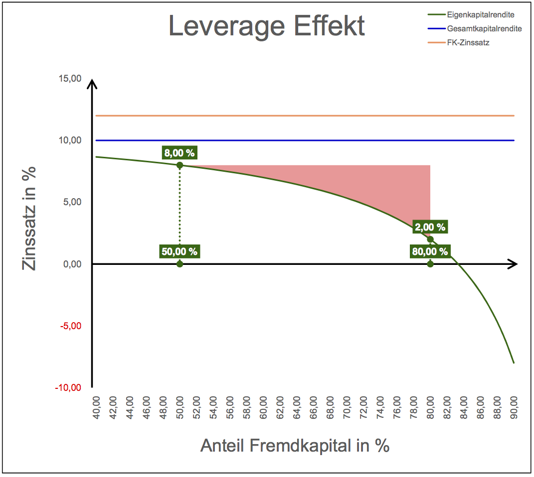 Leverage Effekt